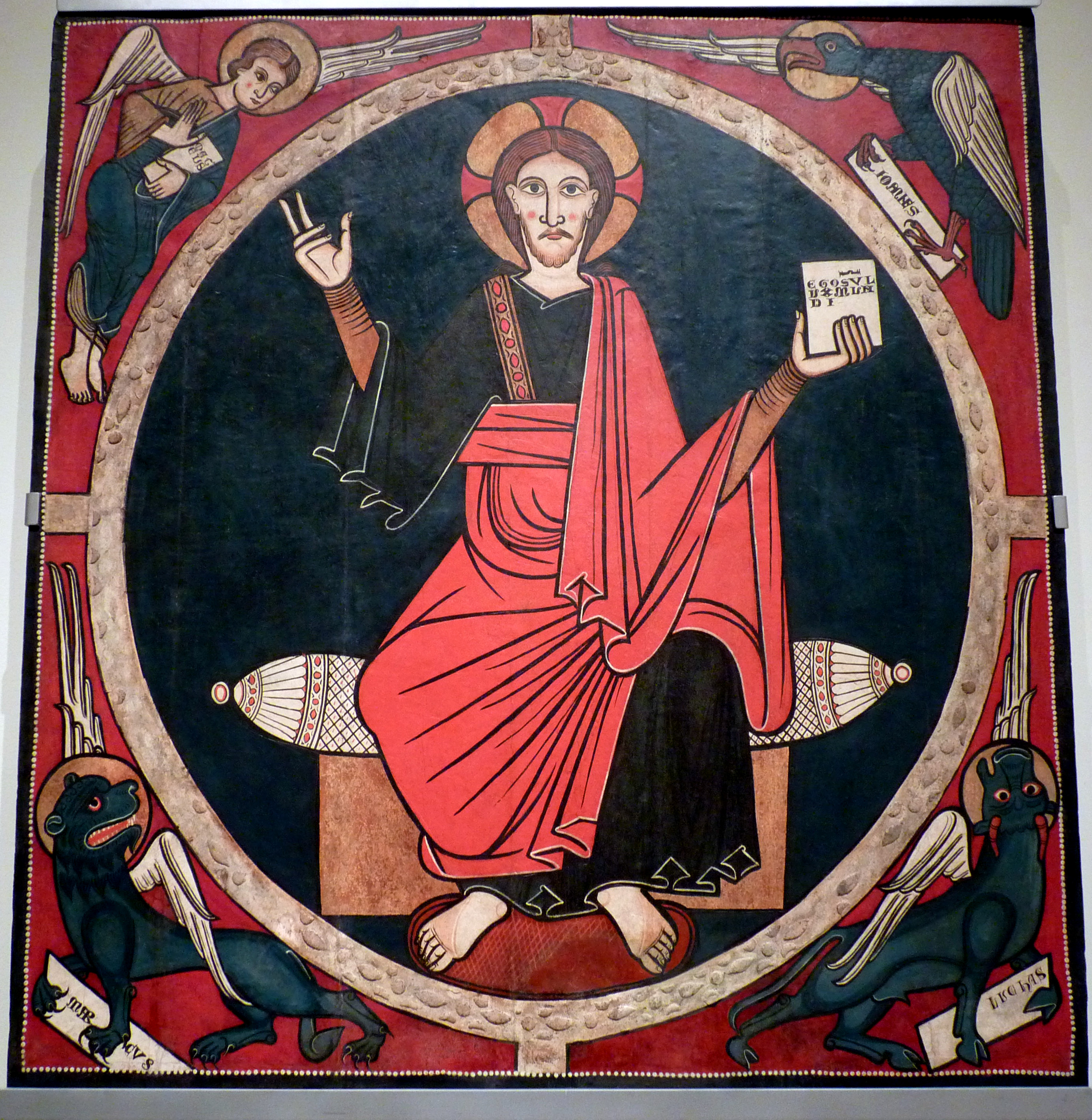 Baldaquí de Tost conservat al Museu Nacional d'Art de Catalunya Barcelona